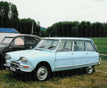 cliché pris lors de la rencontre internationale en Holande (1997)